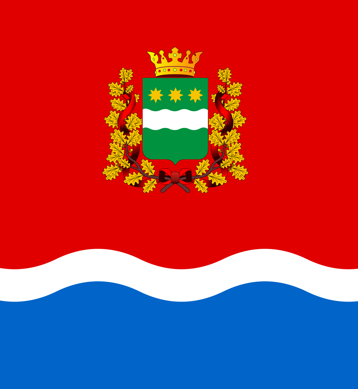 Штандарт Губернатор Амурской области